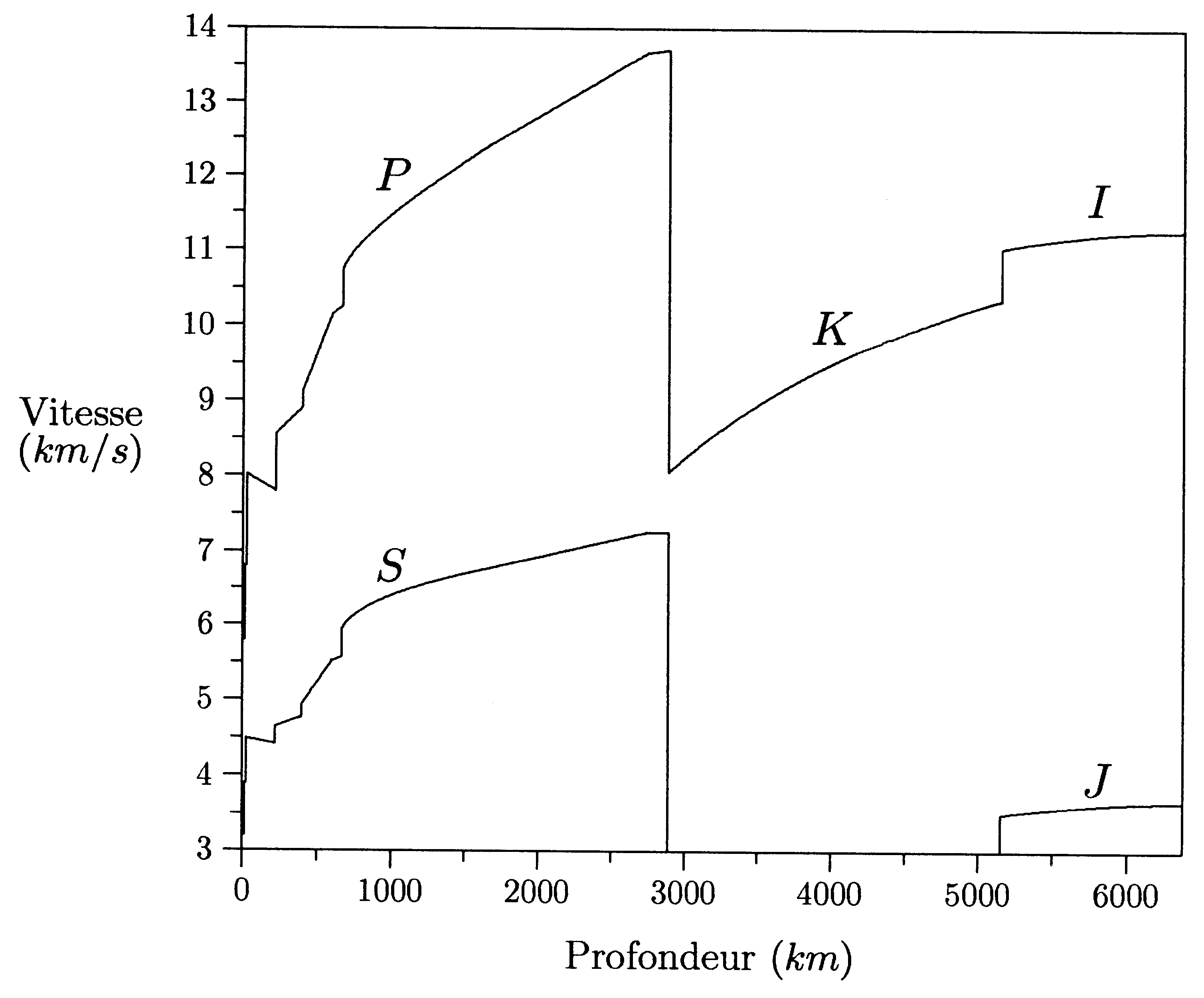 Courbes de vitesse du modèle PREM.